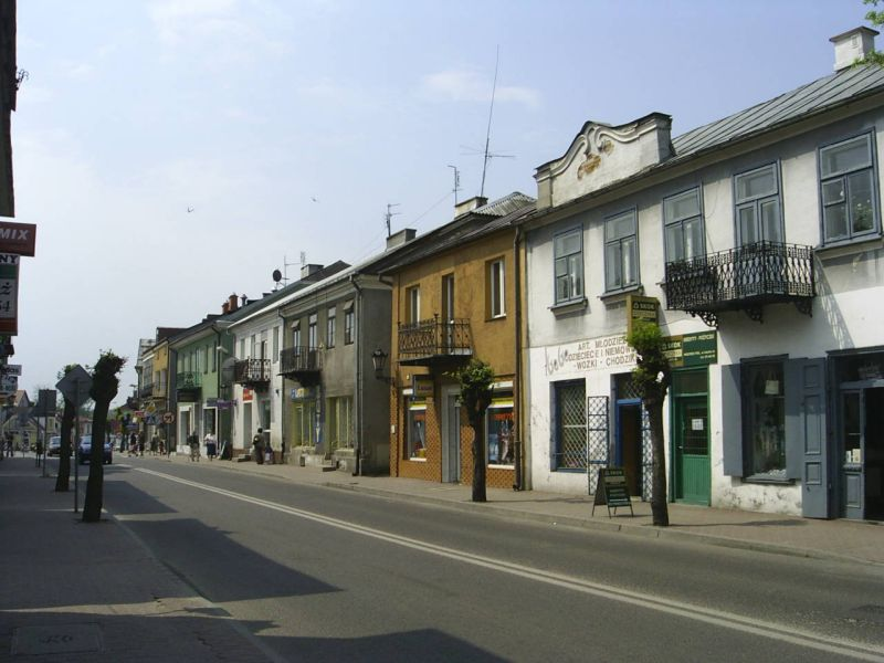 Ul. Lubelska w Międzyrzecu Podlaskim